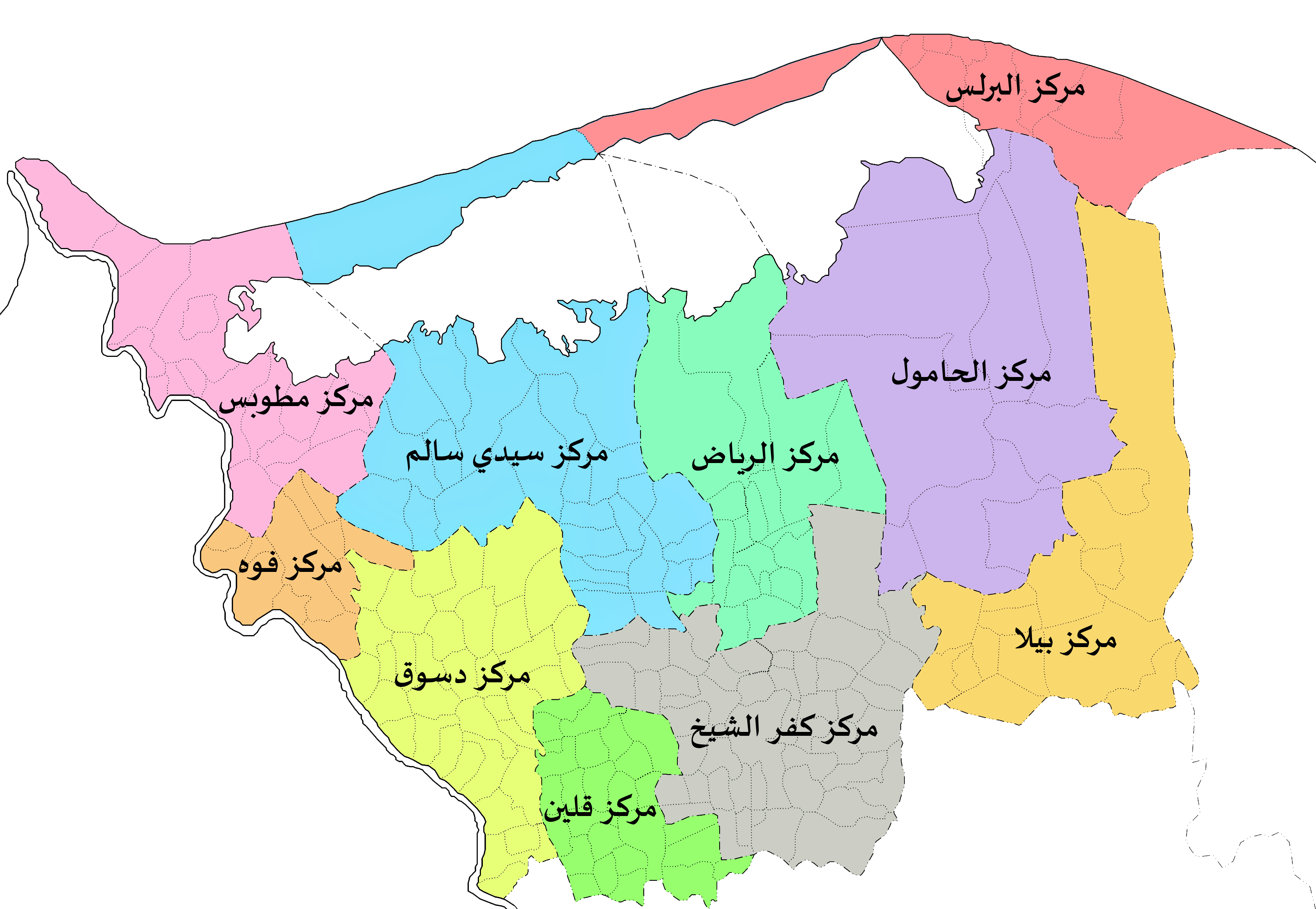 محافظة كفر الشيخ، مصر